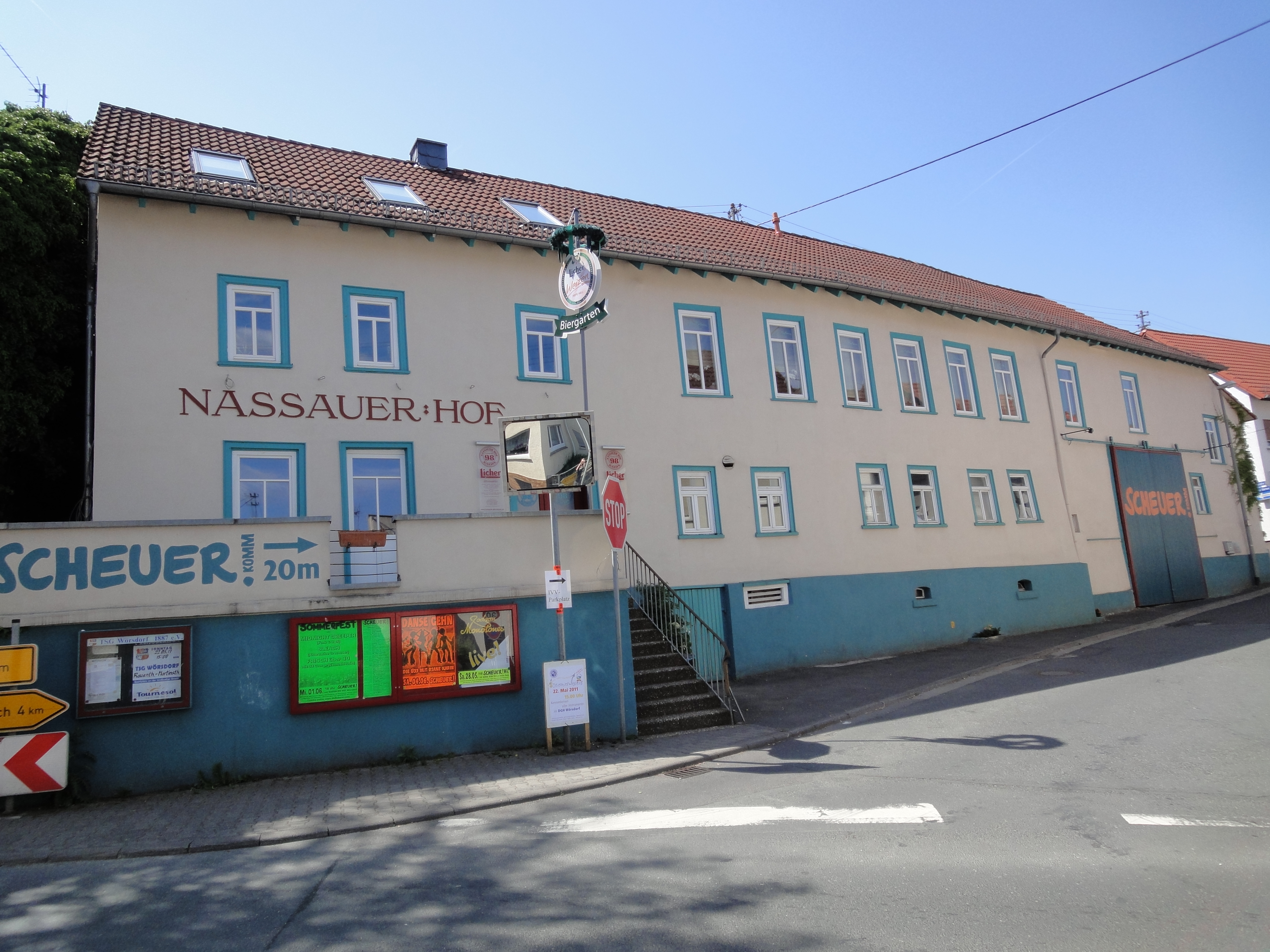 Das denkmalgeschützte Gasthaus Nassauer Hof in Idstein Wörsdorf